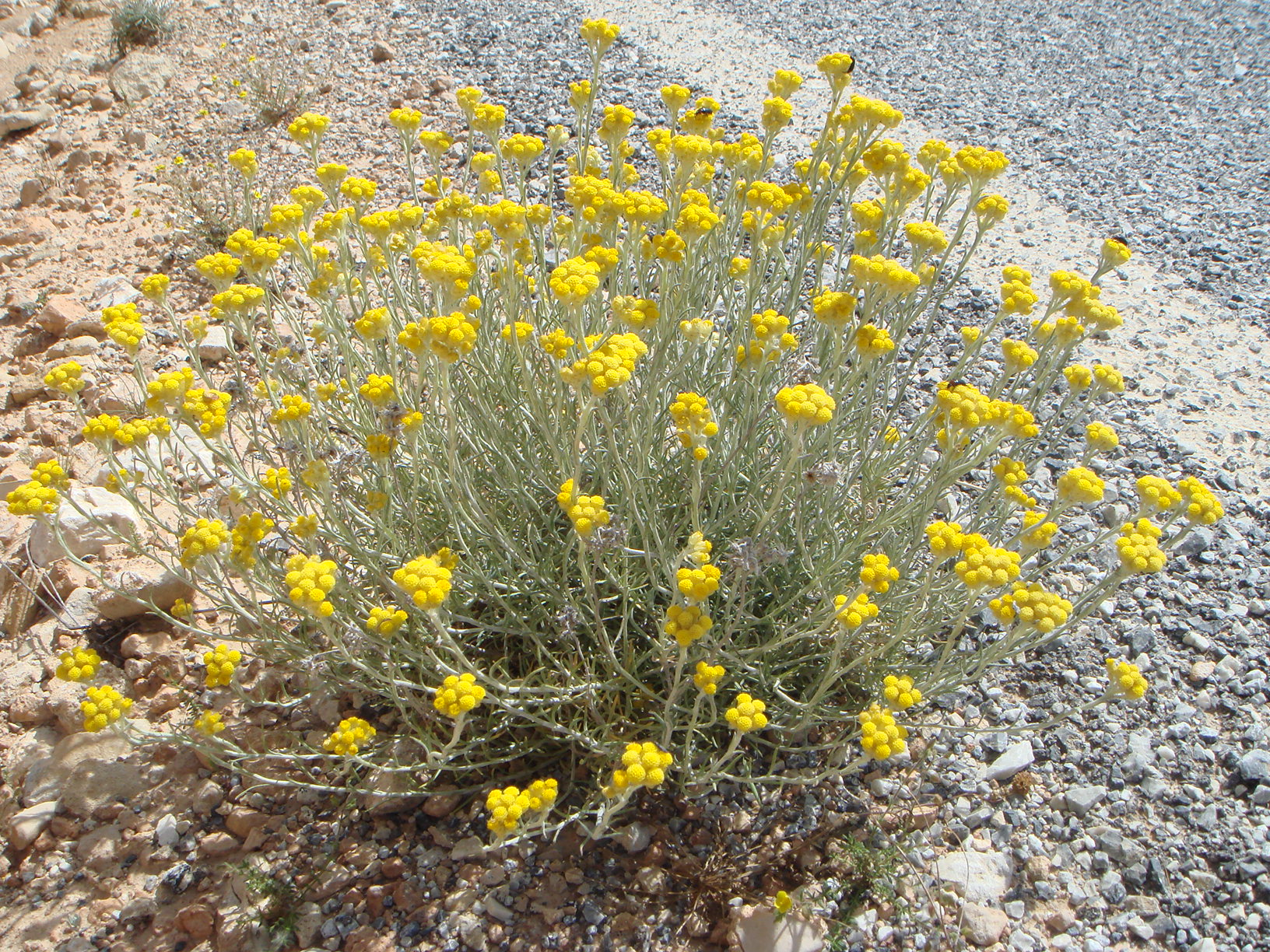 Helichrysum stoechas, Villanueva de las Torres, Granada, España